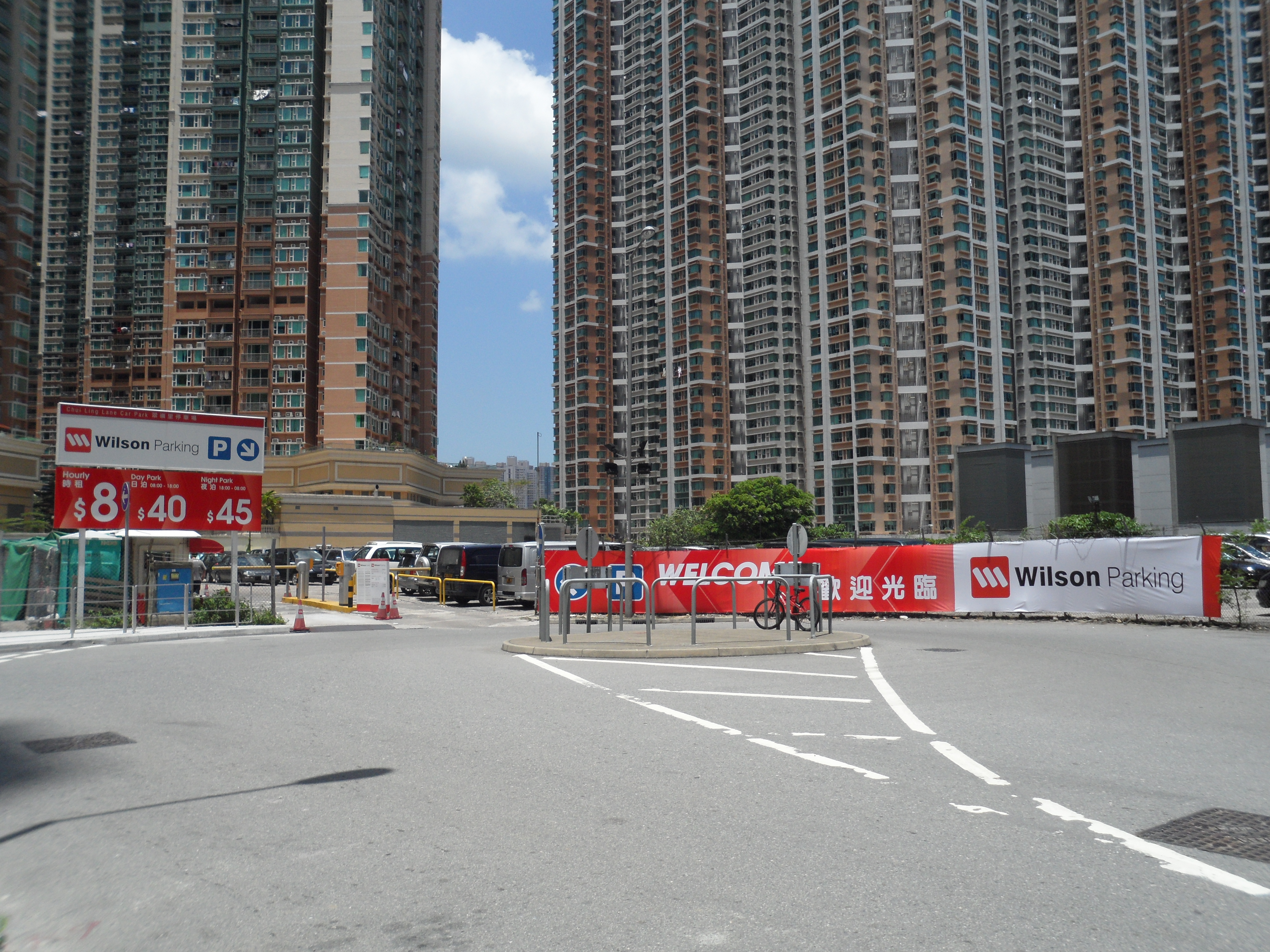 善明邨威信停車場外貌